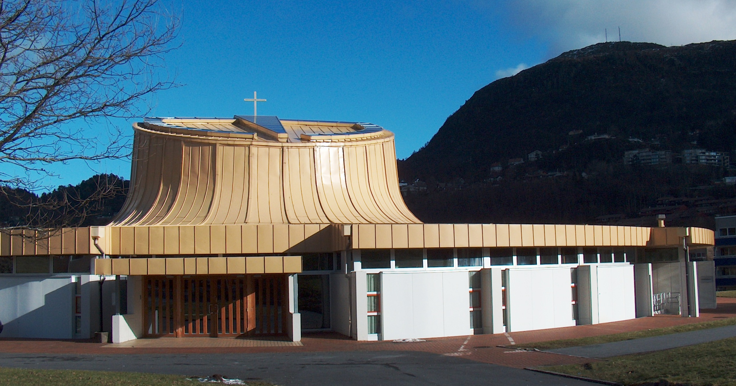 Fyllingsdalen kirke inngang